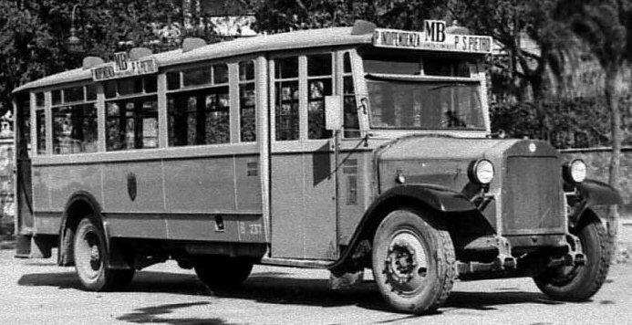 Autobus Lancia Omicron di Roma